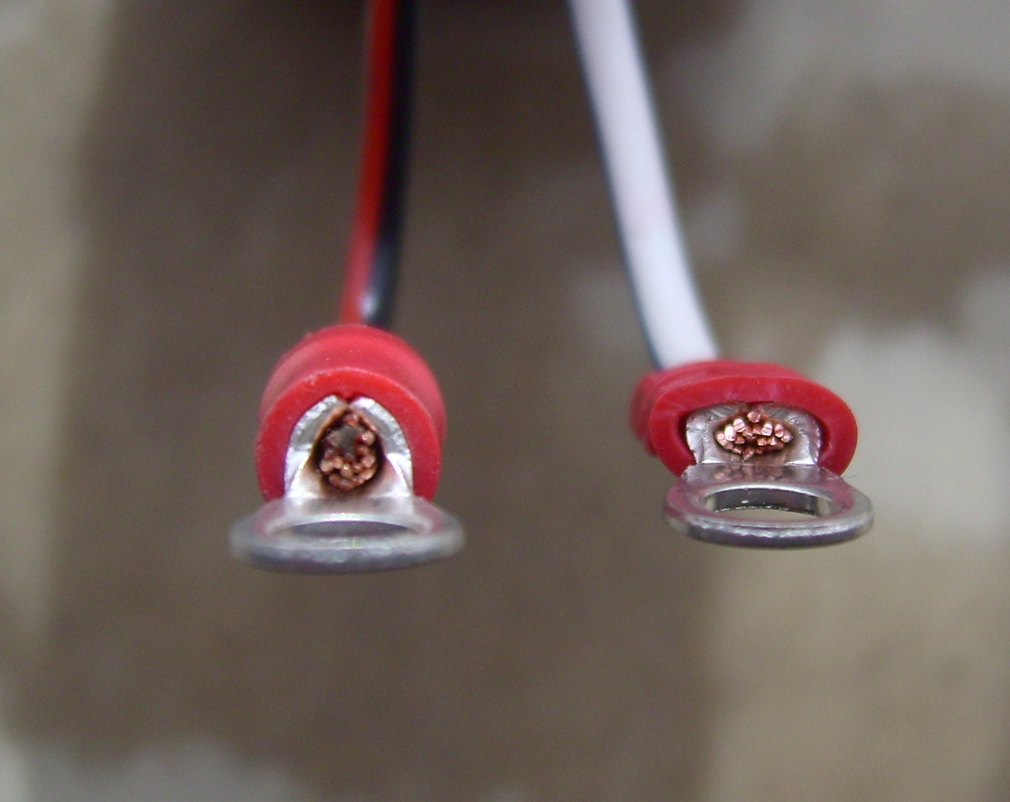 Zwei Kabelschuhe Nahaufnahme; vor und nach dem Crimpen